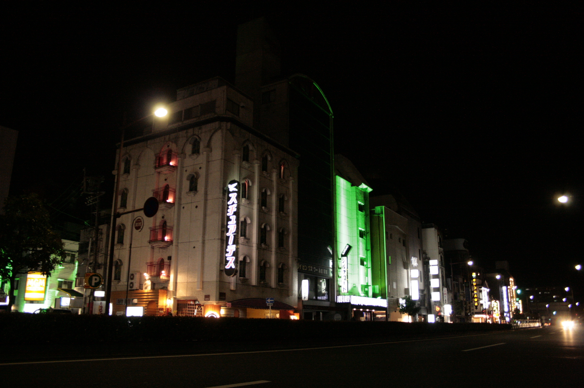 金津園の夜景、岐阜駅側から見た表通り